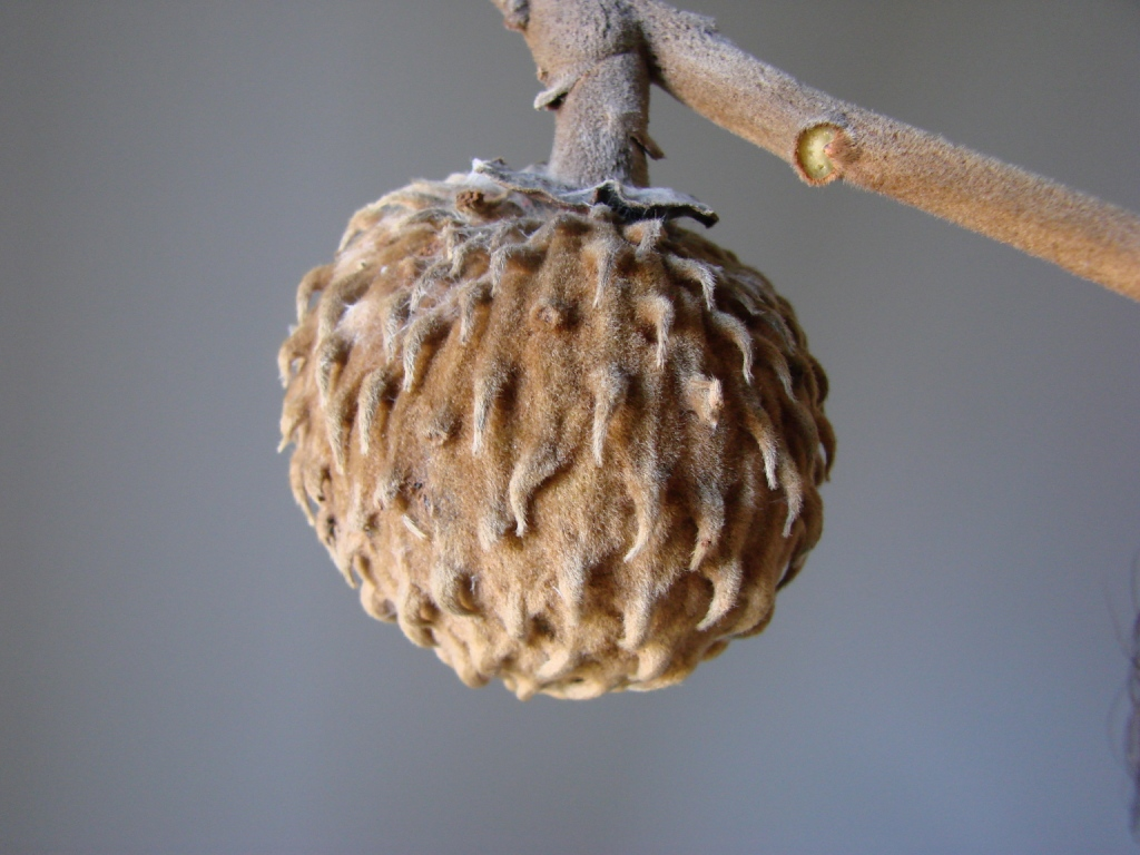 Annona monticola - ANNONACEAE UNB - Brasilia - DF - Brasil.